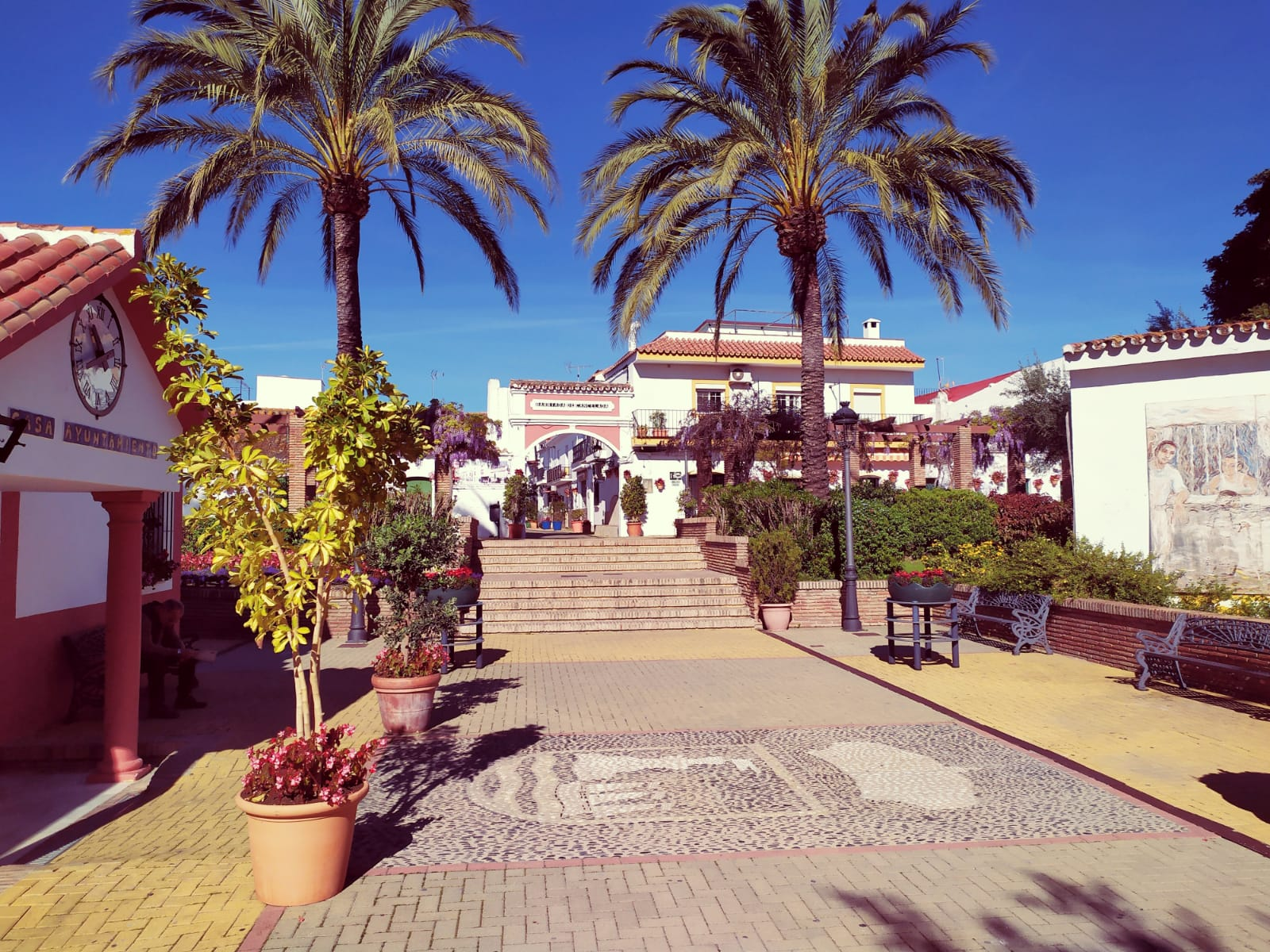 Plaza José Vázquez Cancelada